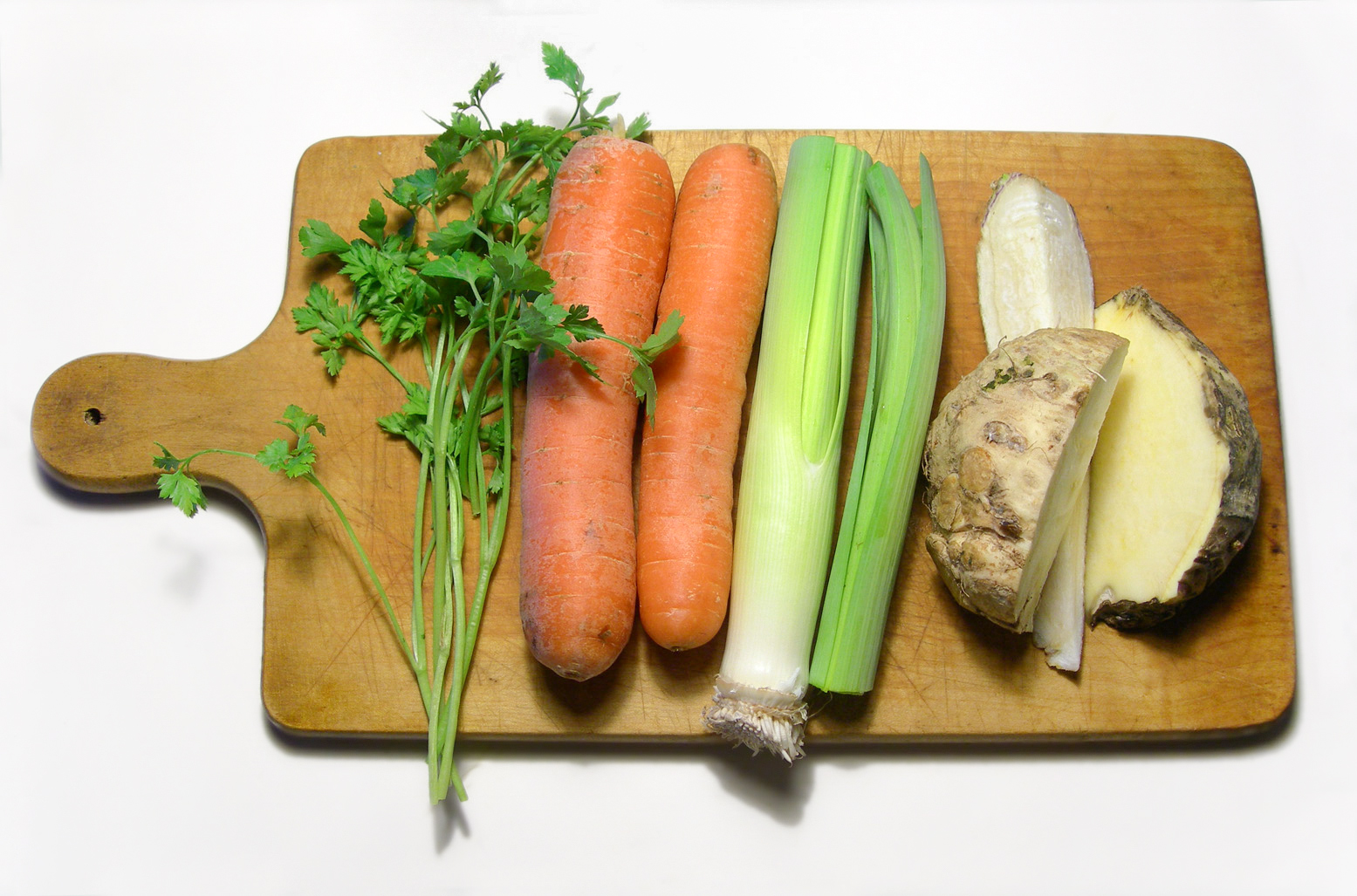 Petersilie, Karotten, Porree (Lauch), Sellerie, Petersilienwurzel, Steckrübe